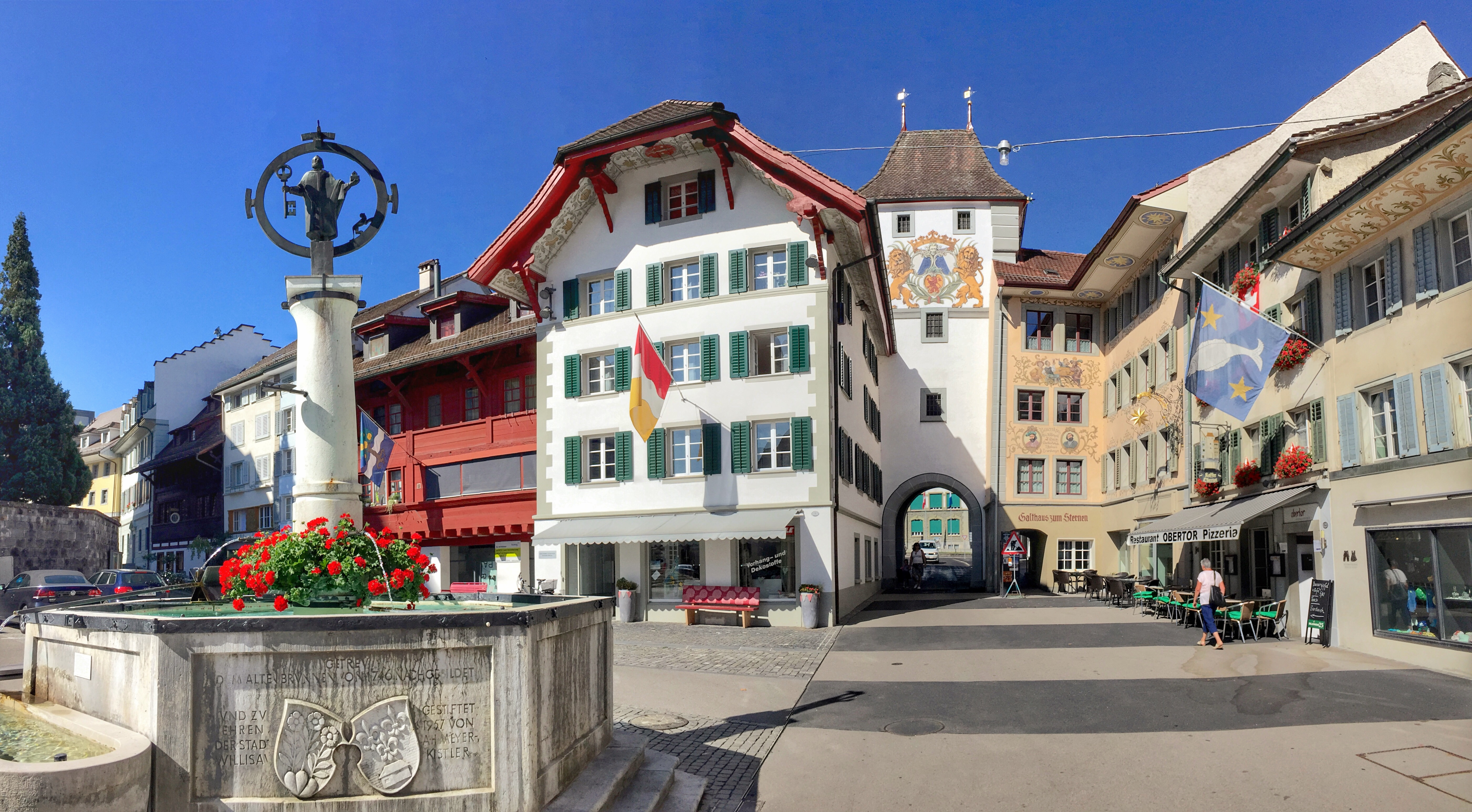 Obertor Willisau mit Oberer Brunnen